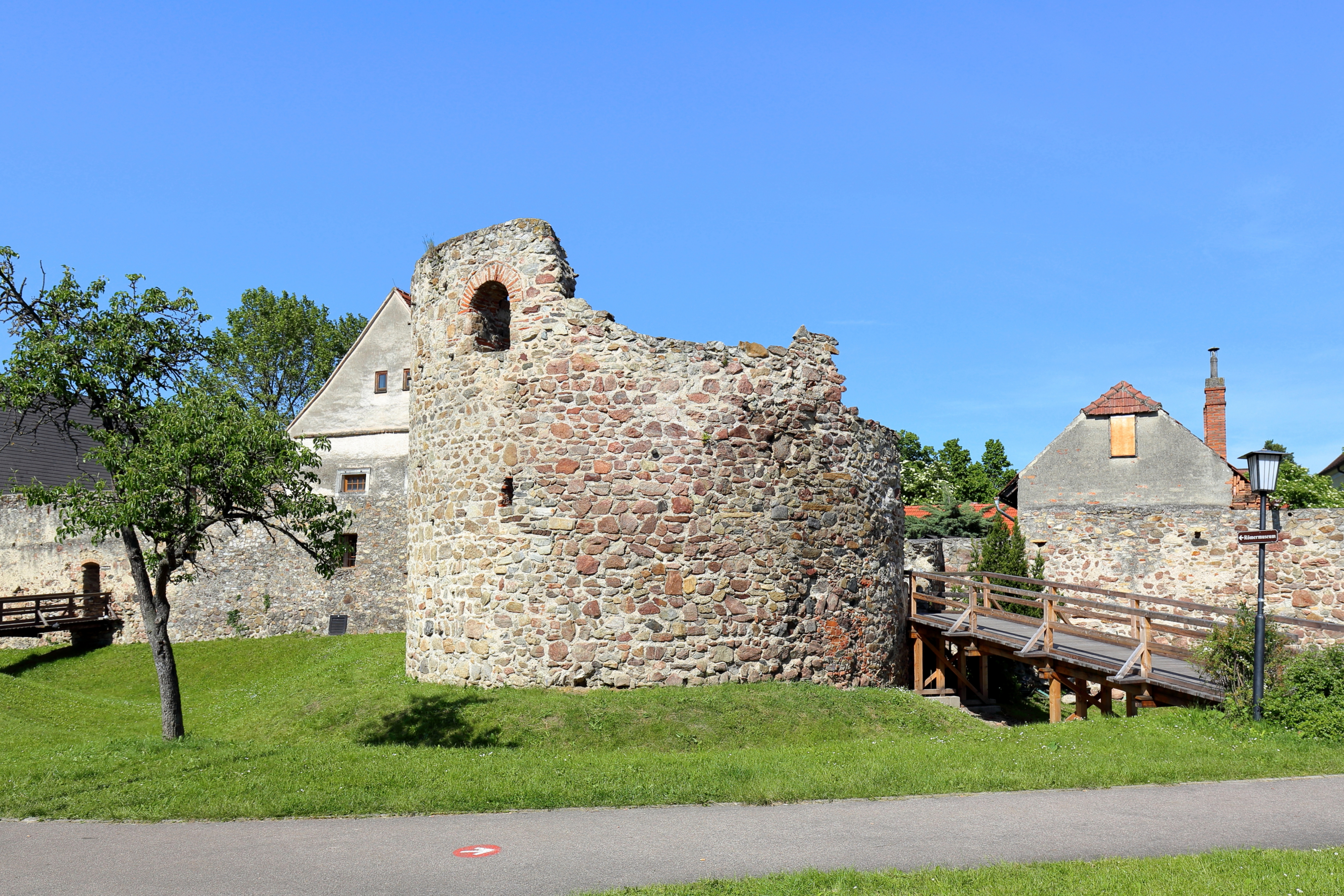 Westansicht des westliche Hufeisenturmes des ehemaligen Kastells Favianis in der niederösterreichischen Stadt Mautern an der Donau. Der Turm stammt vermutlich aus dem 4. oder 5. Jahrhundert.